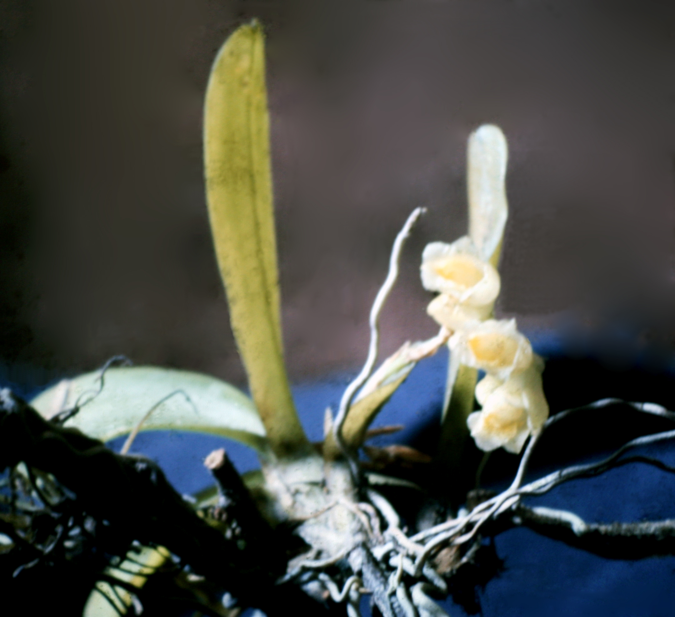 Rodriguezia flavida, Suriname.